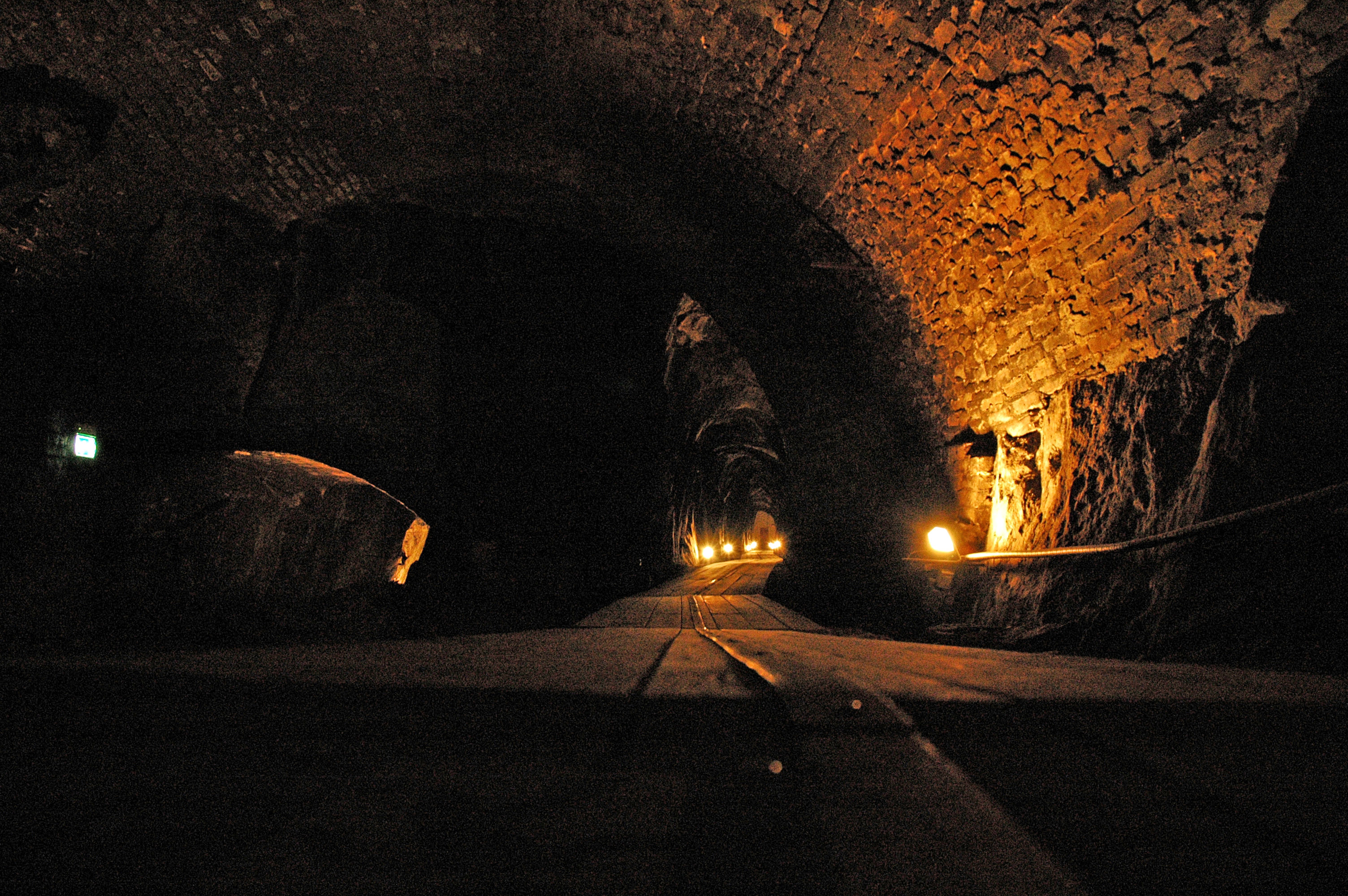 Christian 7.s stoll / 'skråplanet